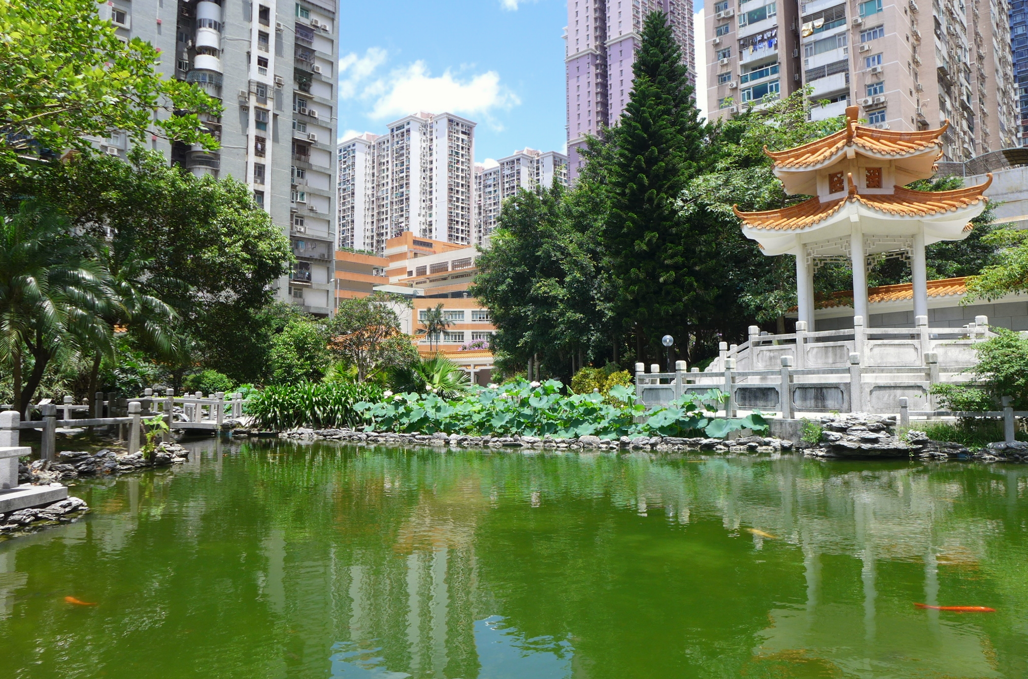 Jardim da Cidade das Flores